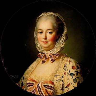 Madame de Pompadour, ol/tl, diam. 54 cm, Museo del Prado, Madrid